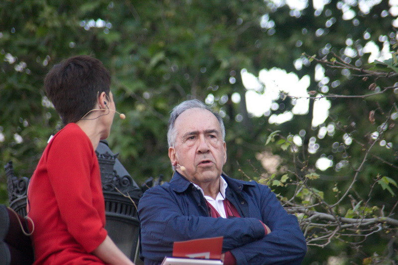 Signatura de llibres en la Diada de Sant Jordi-2015 a Barcelona